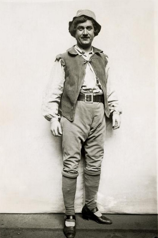 Karel Kügler (1885 - 1950), Český operní pěvec–tenorista, herec, režisér a pedagog v roli Jeníka v opeře A.Dvořáka Král a Uhlíř (1914)